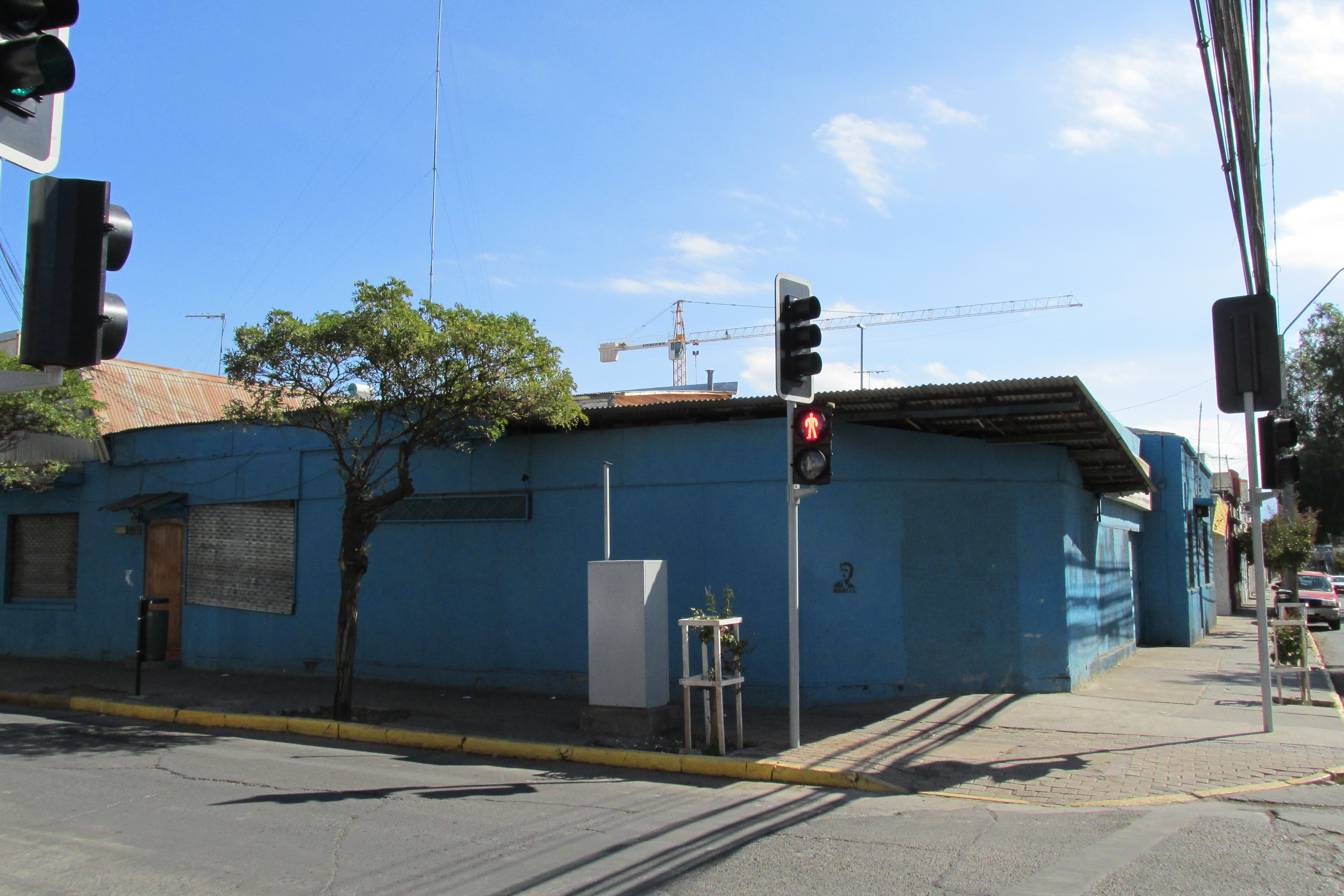 Diario El Rancaguino, ubicado en la calle Oficial Carlos María O'carrol 518 esquina calle Campos, ciudad de Rancagua